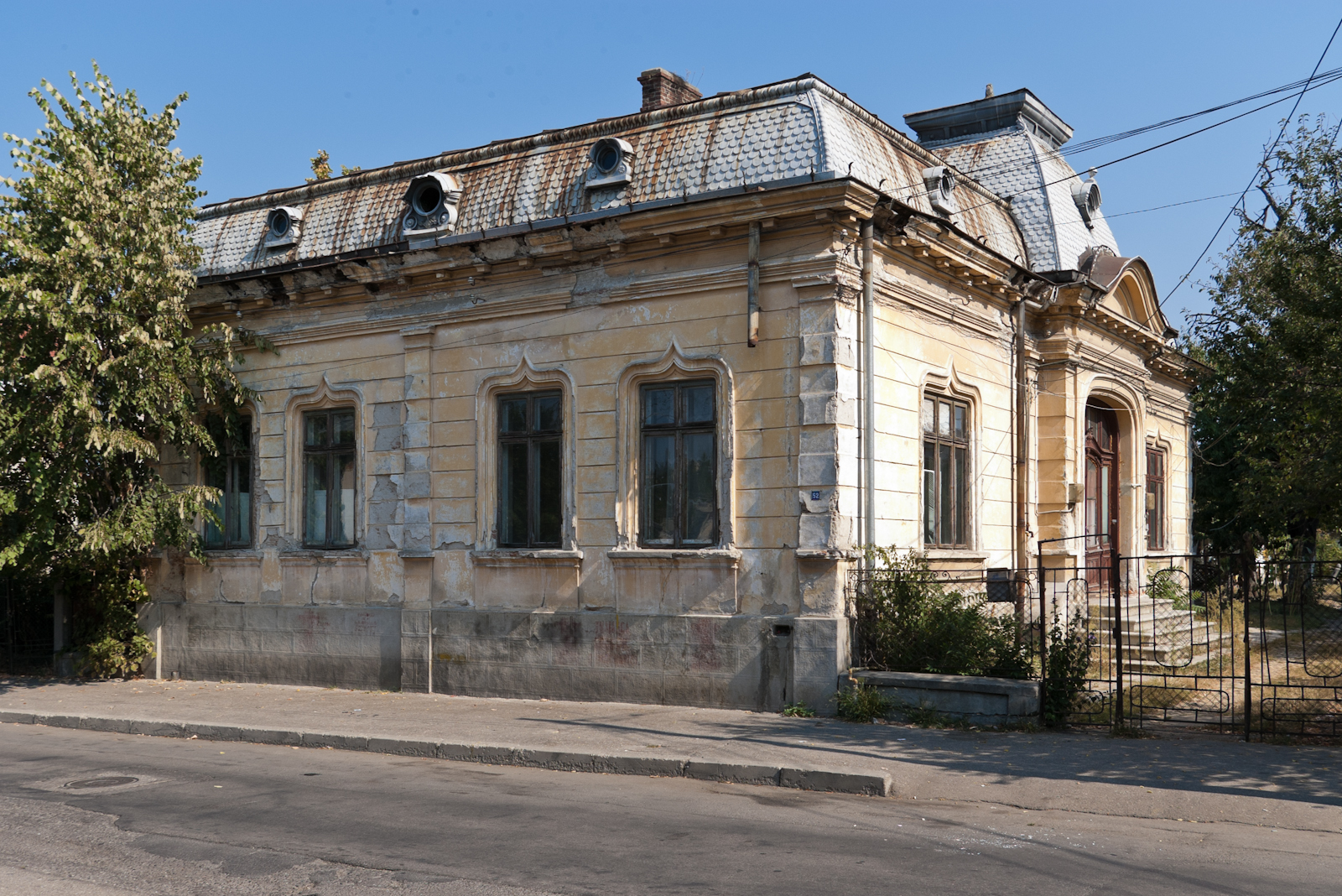 Fotografia prezinta casa de pe str. Victoriei 52, vazuta dinspre S.